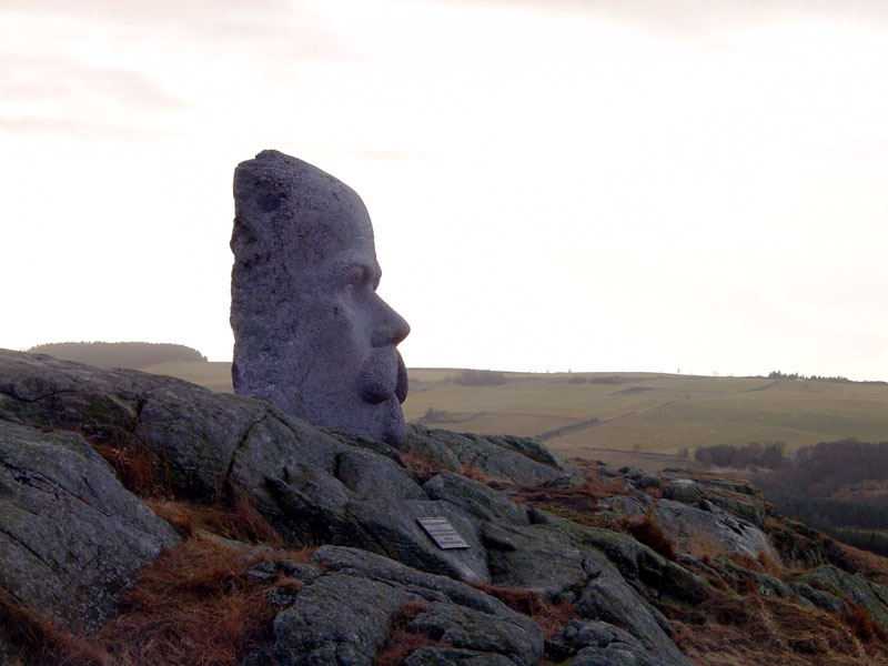 Knudaheio